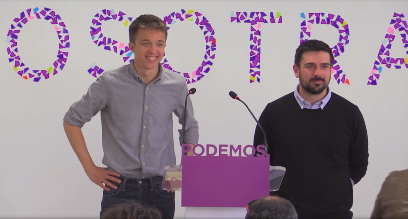 Cuidar Podemos. Rueda de prensa de Pablo Iglesias